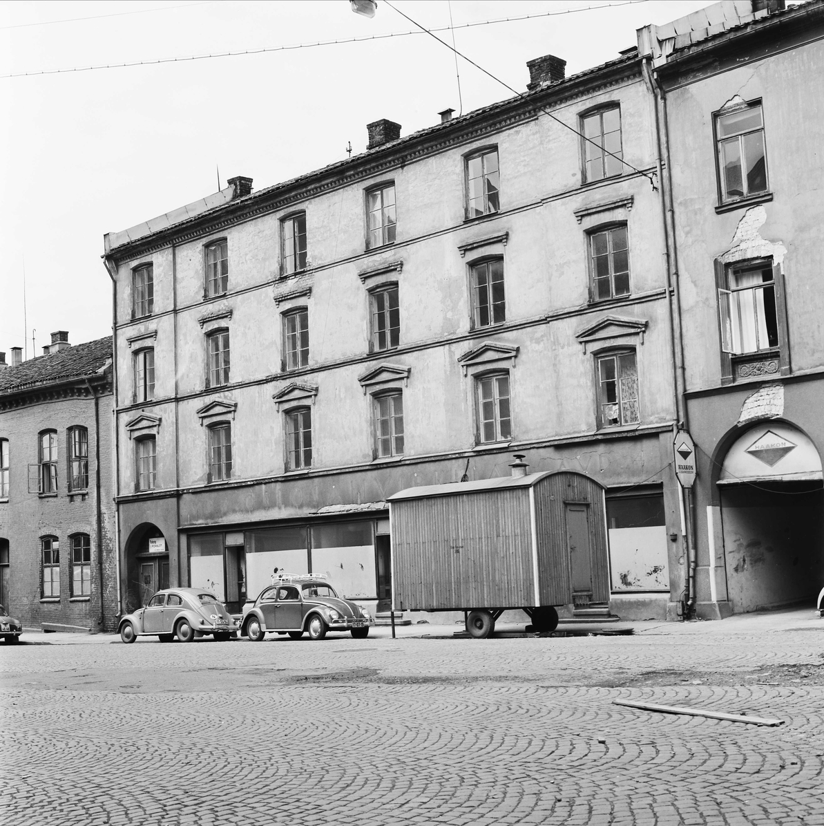 Munkedamsveien 17 i august 1963. Foto: Knut Eng. Fra Byhistorisk samling hos Oslo Museum.